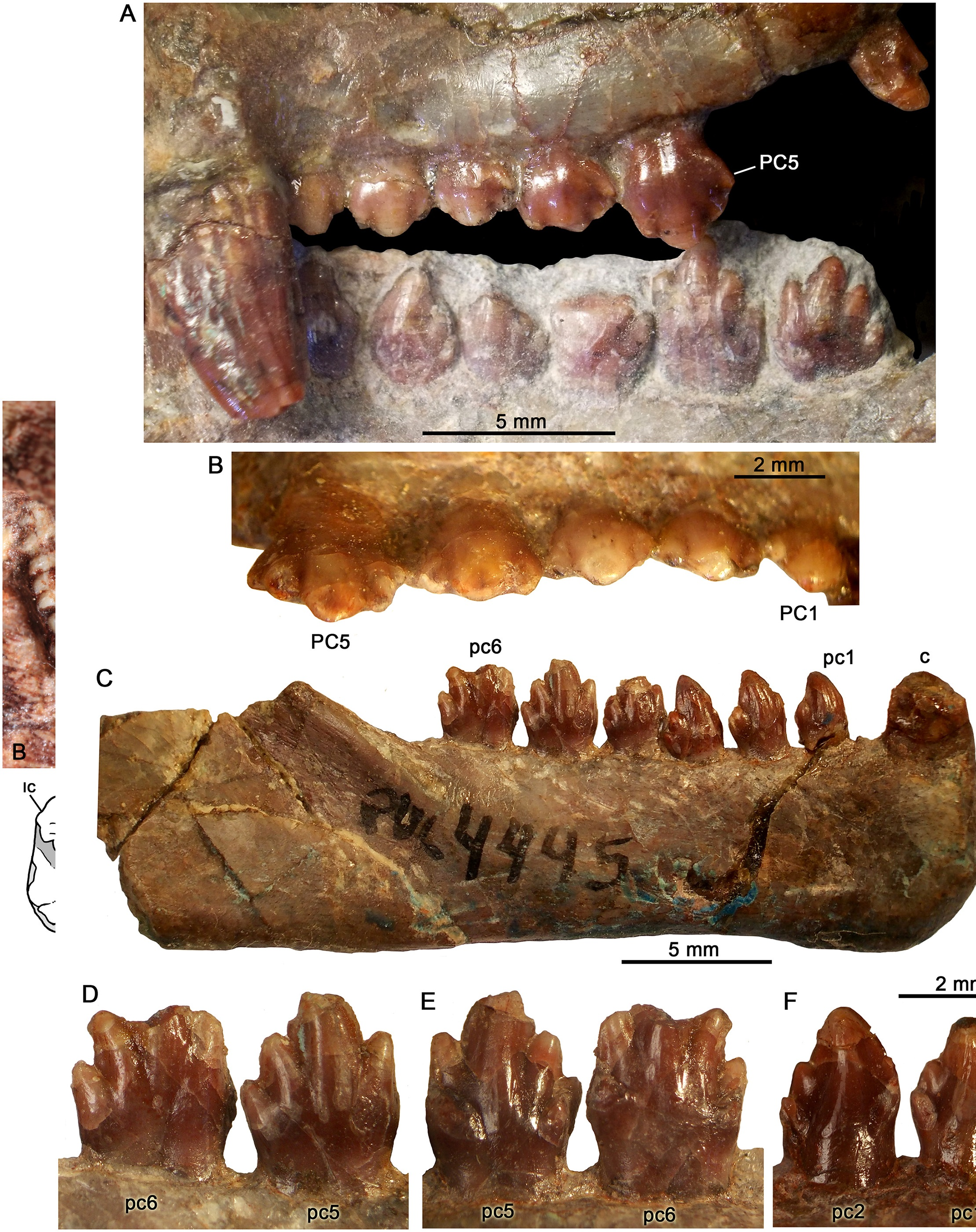 Details of the postcanine dentition of Probainognathus jenseni from Chañares Formation, Ischigualasto-Villa Unión Basin, western Argentina. Upper and lower postcanines (A) and detail of the lingual aspect of the upper postcanines (B) (picture taken in ventrolingual view) of PVL 4673. Right lower jaw in labial view (C) and detail of pc5 and pc6 in labial (D) and lingual (E) views of PVL 4445. Left lower pc1and pc2 in lingual view (F) of PVL 4446.